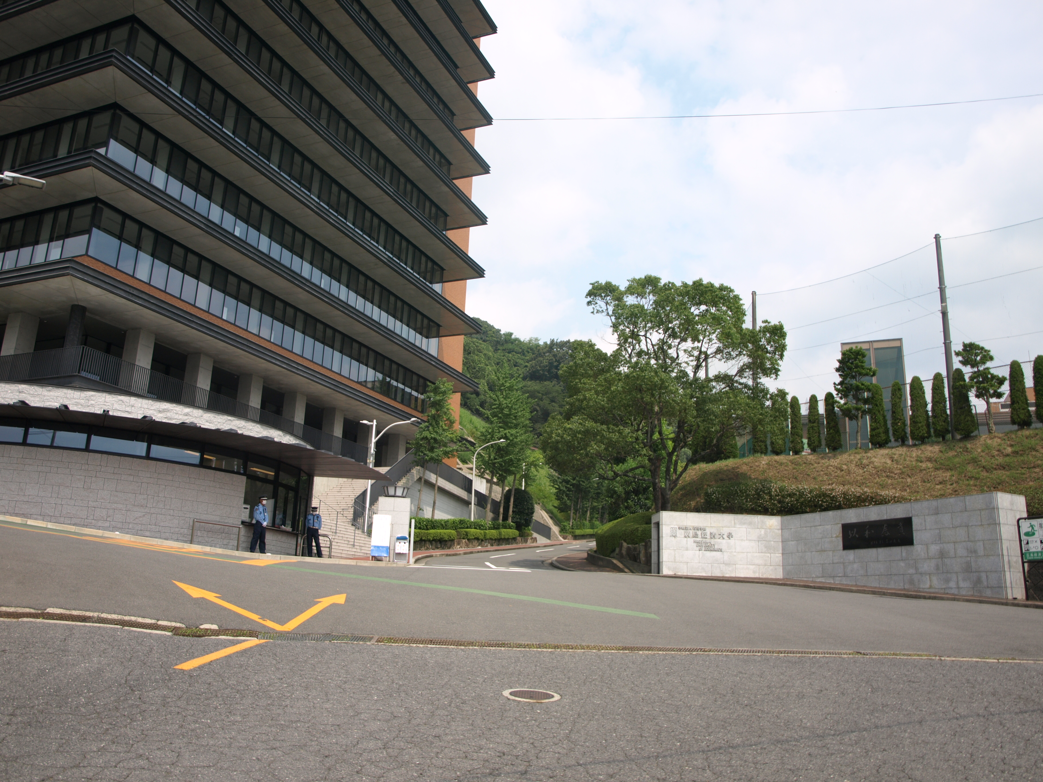 広島経済大学